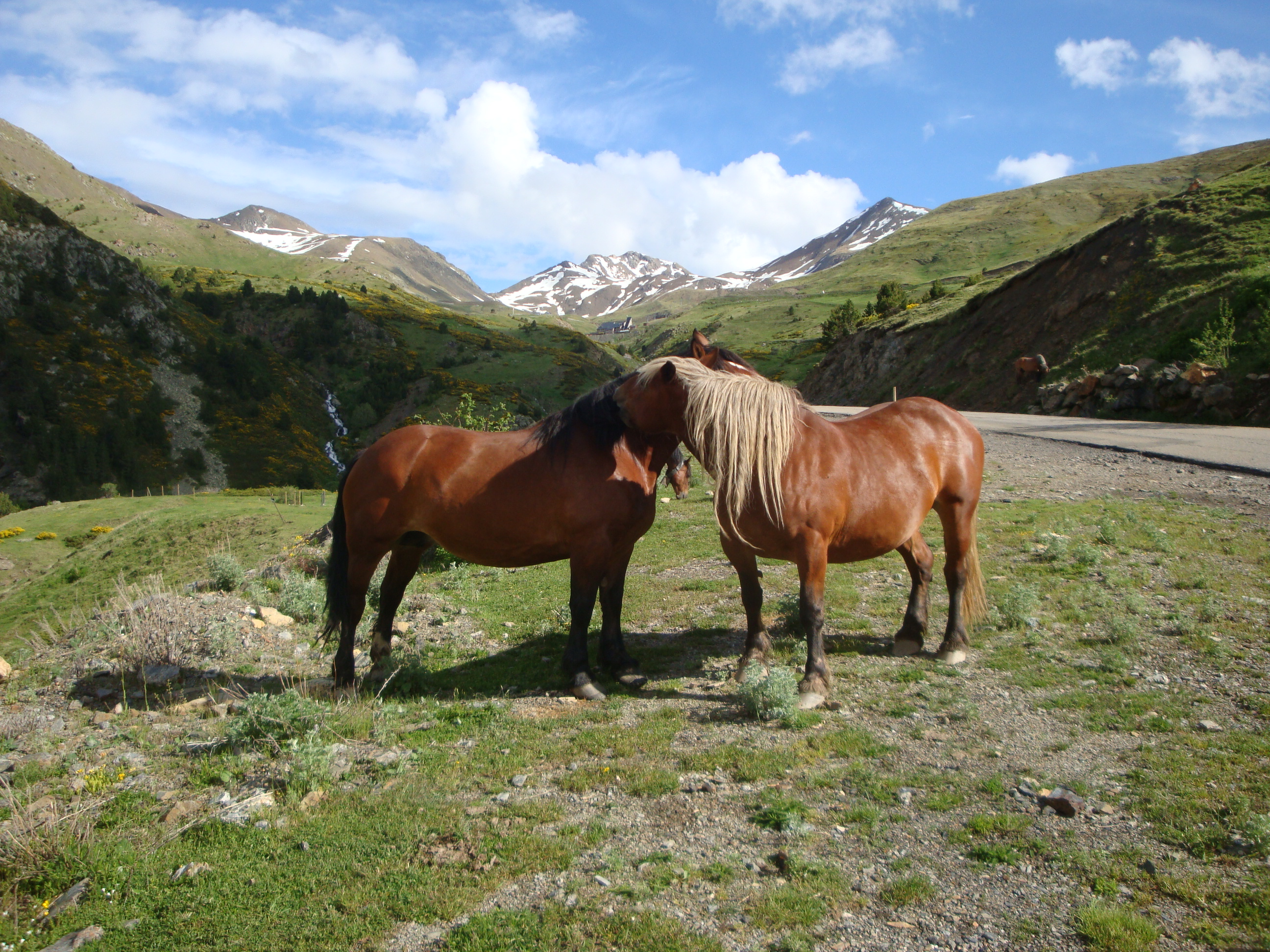 Caballos en el Vall de Boi (LLeida) España